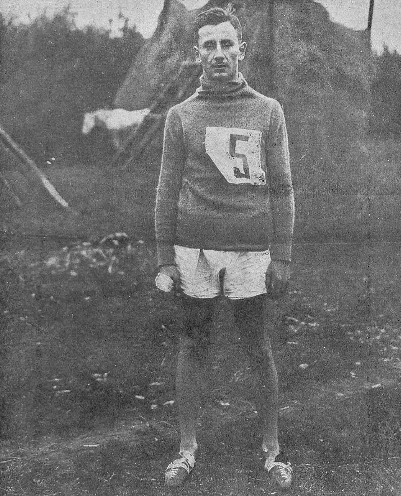 Stefan Szelestowski (1924)